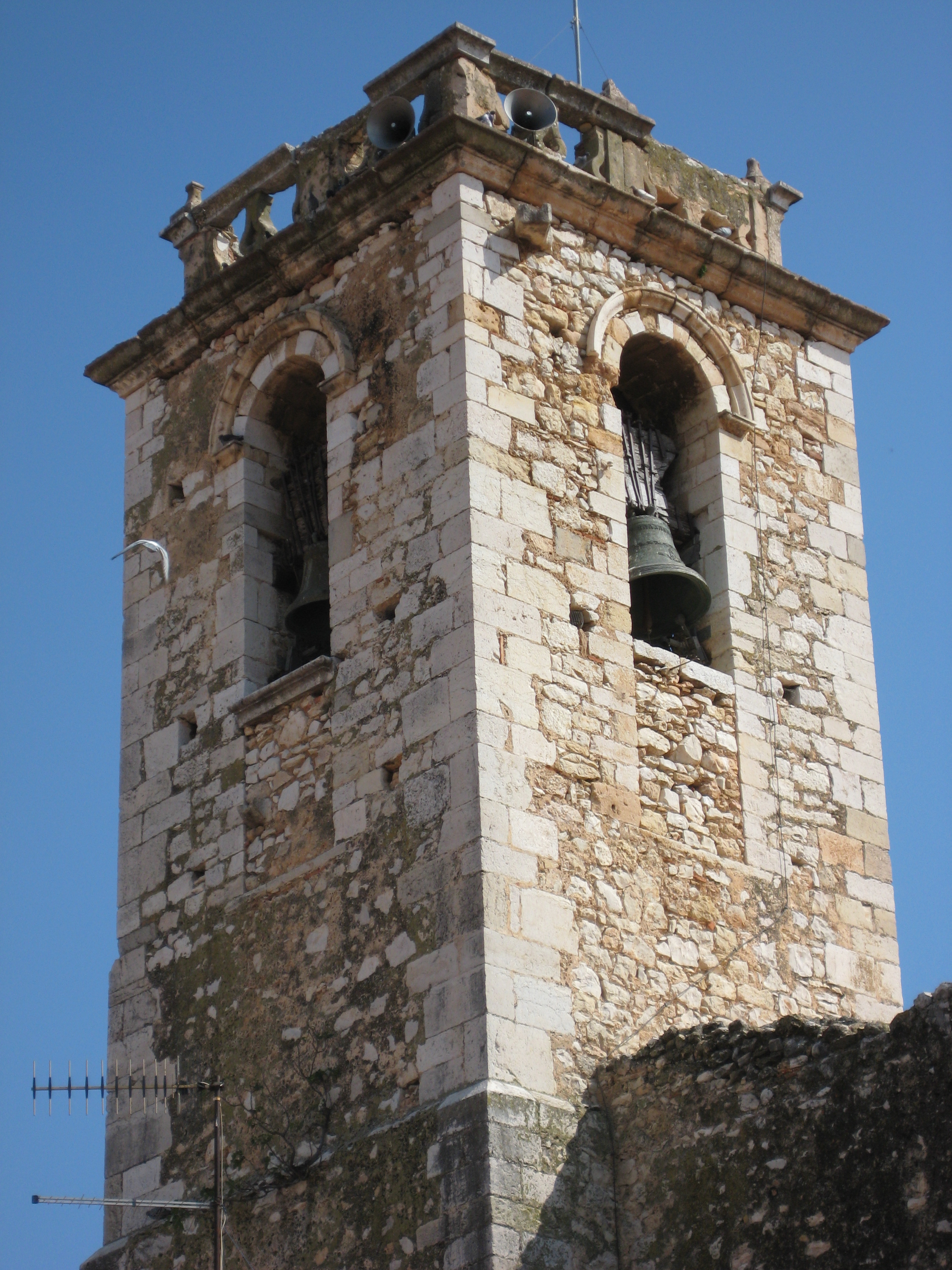 Campanar de l'església de Sant Miquel Arcàngel de Canet lo Roig (Baix Maestrat)